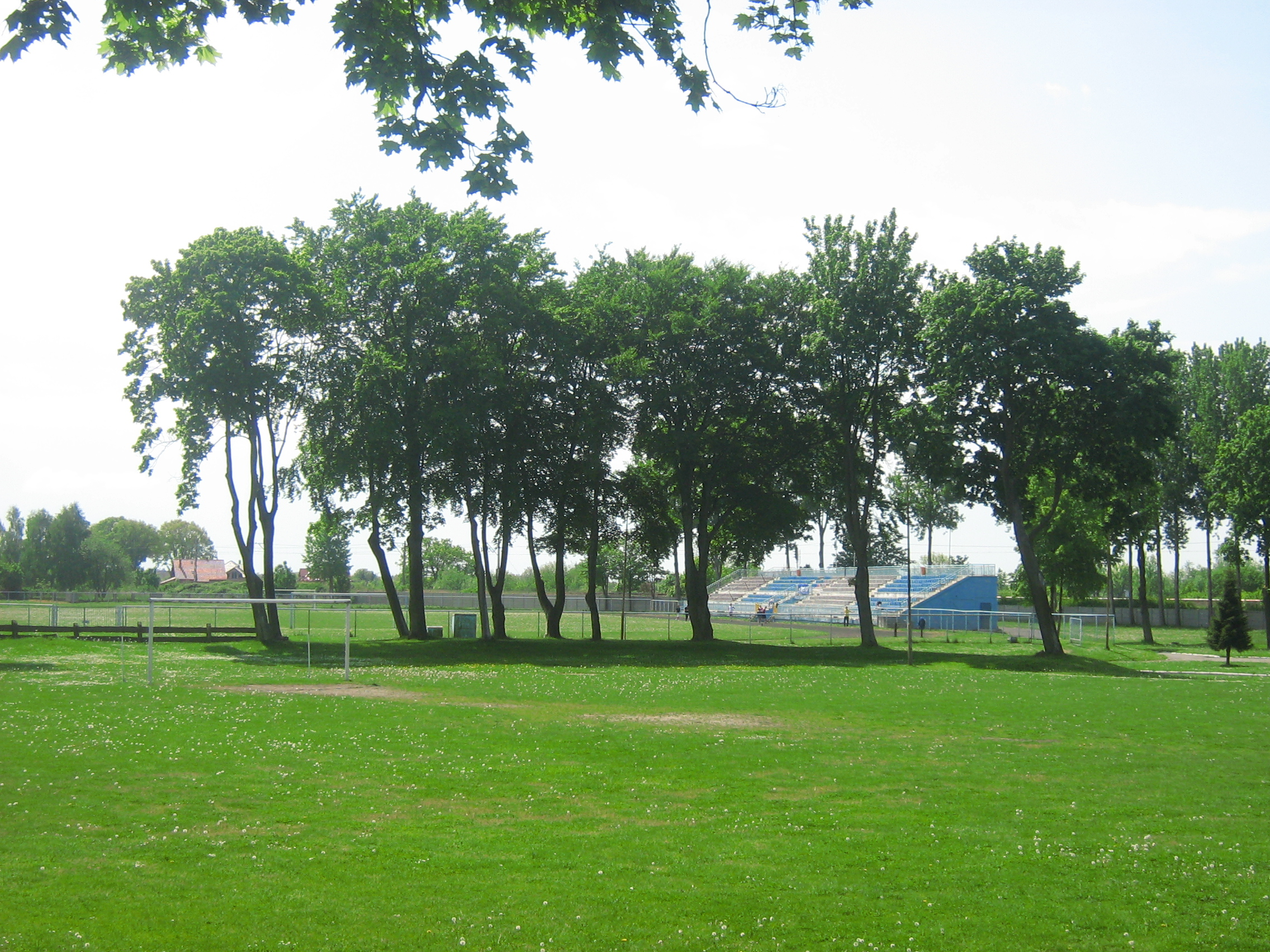 Stadion Gryfa w Kamieniu Pomorskim